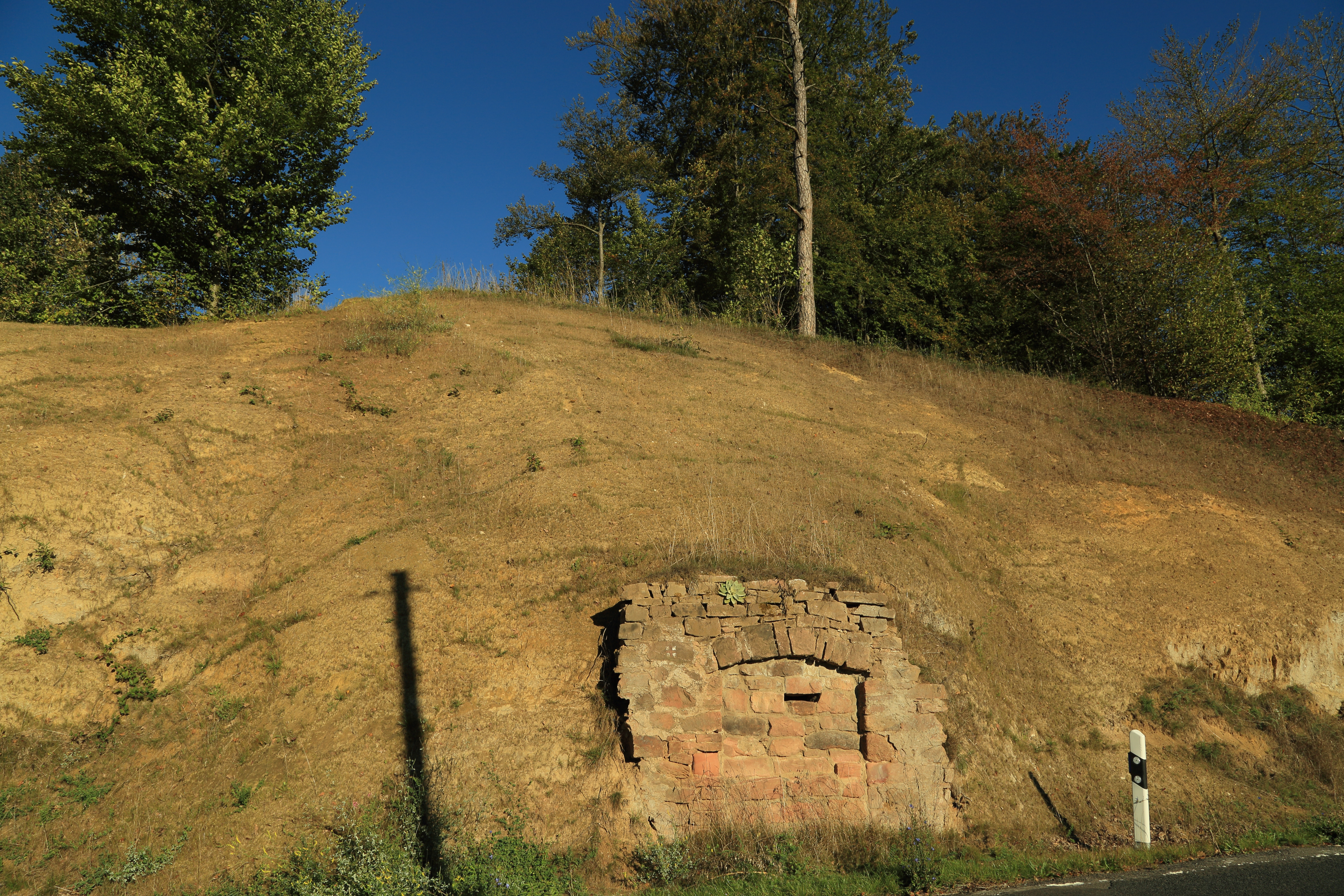 Straßenaufschluss SW von Wesemichshof Geotop-Nummer: 671A003 5821GT000001 Kleinkahl Aschaffenburg 5821 Bieber R: 4305969 H: 5556847 260 m ü.NN L: 25 m, B: 22 m, H: 3 m, F: 50 qm Spessart An der Strasse ist massiger gelblicher Zechsteindolomit aufgeschlossen, der an steilen Störungen zum Teil brekziiert ist. Wurzelbildung und Schwerspatgänge sind oberhalb der Straße gut sichtbar.